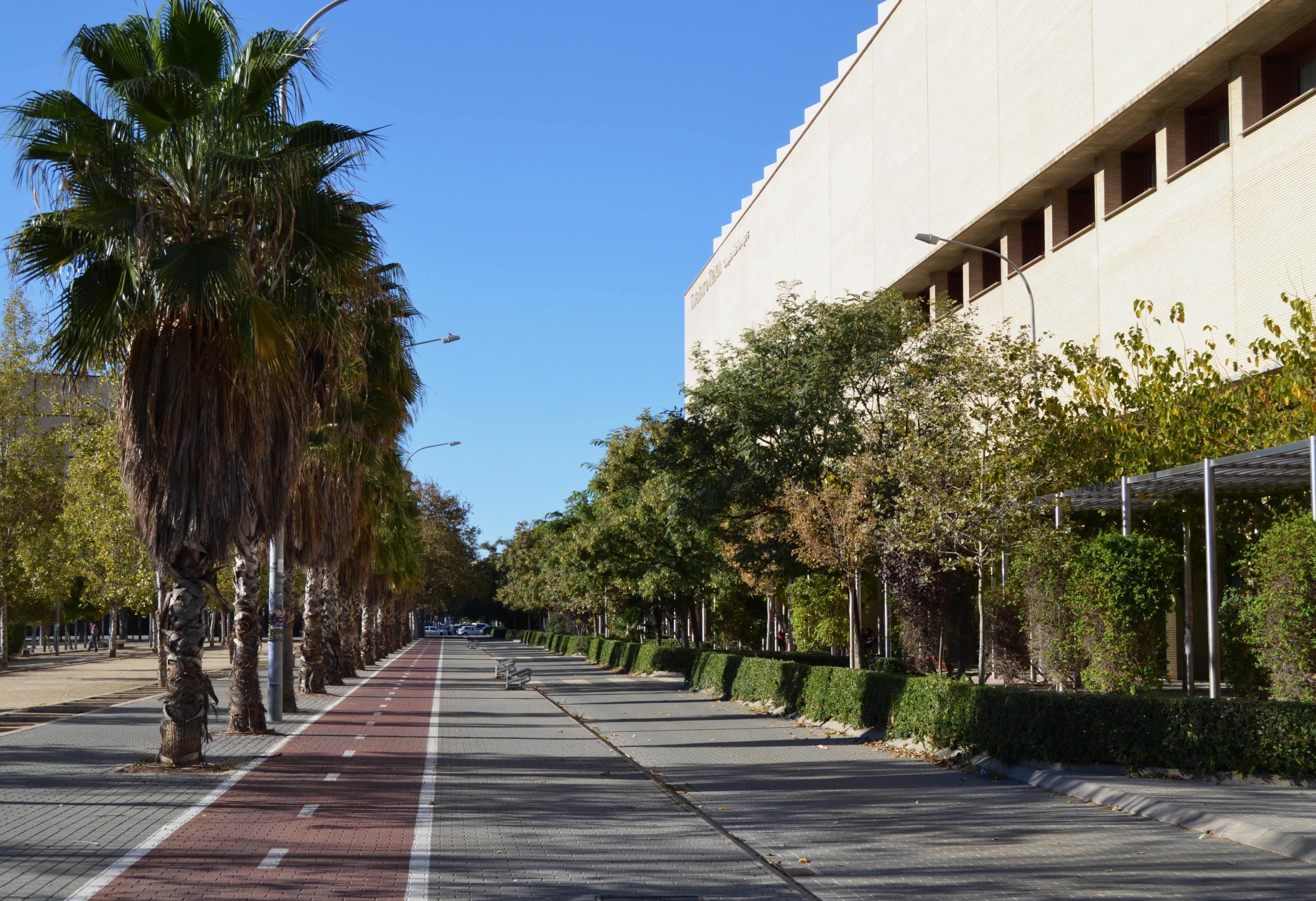 Carrer amb carril bici al campus dels Tarongers, València.